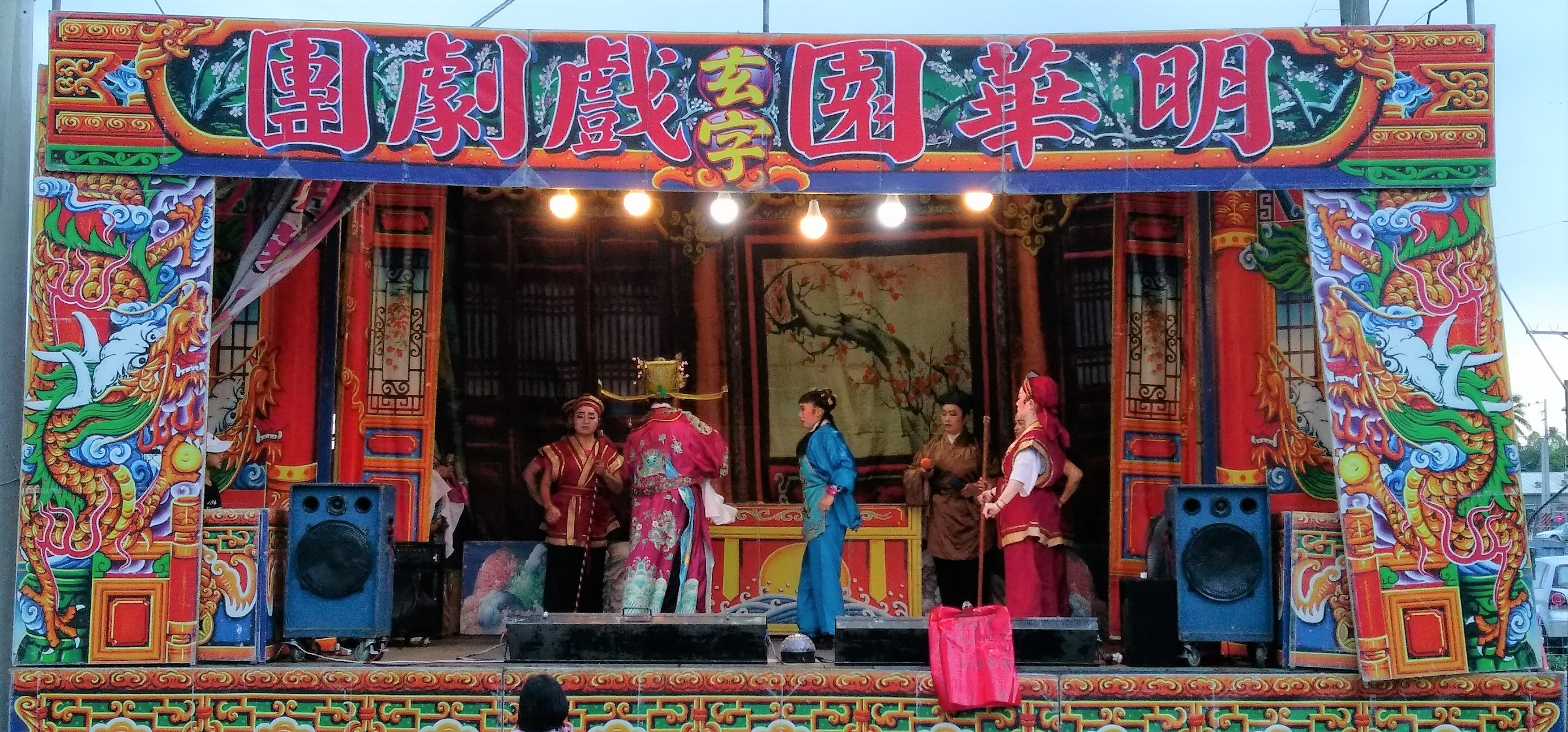 中文（台灣）: 明華園玄字團演出